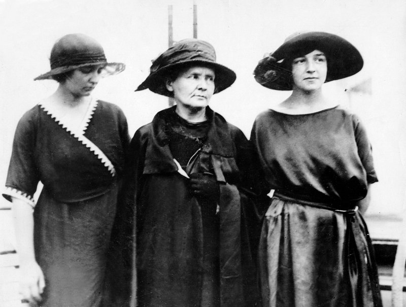 En 1921, une collecte est organisée aux États-Unis auprès d'associations de femmes, par une journaliste américaine Mary Meloney (1878-1843), admiratrice de la savante. Le but de l’opération est d’offrir à Marie Curie un gramme de radium, qui vaut à l’époque 100 000 dollars (environ 1 200 000 € actuels). Celle-ci se rend, accompagnée de ses filles, aux États-Unis, où elle est accueillie triomphalement en mai-juin 1921. Elle va, durant six semaines, faire une véritable tournée dans l’Est des États-Unis. Le président américain Warren G. Harding en personne lui remet une clef honorifique durant une cérémonie officielle à la Maison Blanche le 20 mai. Celle-ci ouvre un coffret contenant un gramme de radium.